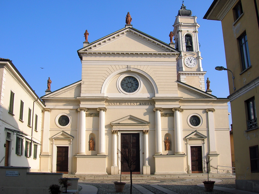 La chiesa parrocchiale di Dorno (PV)